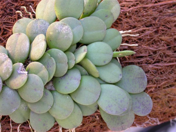 Photos by Americo Docha neto & Dalton Holland Baptista first published in Orchidstudium.